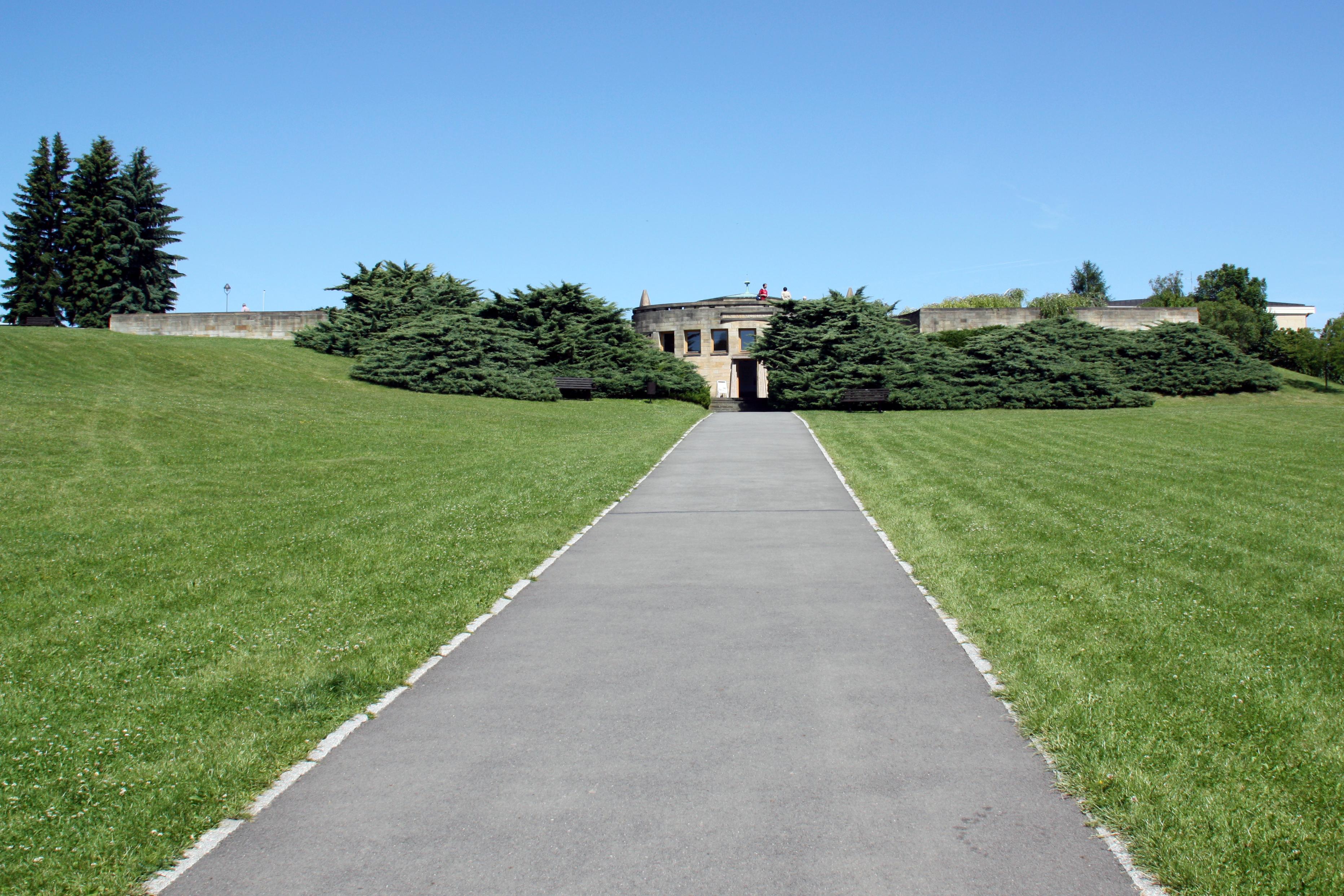 Lidice Blick auf die Gedenkstätte